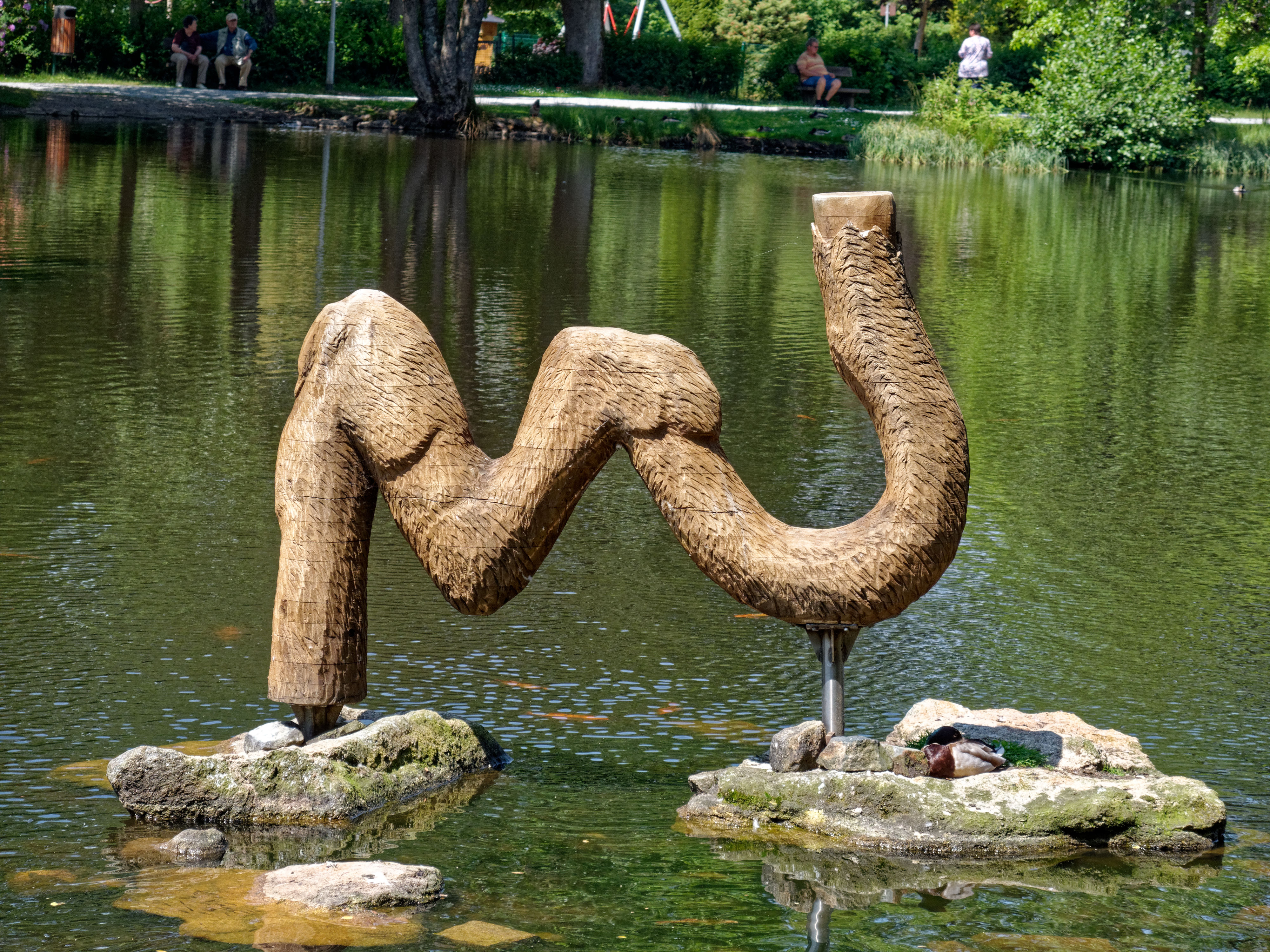 Nachbildung der einst am Gipfel der Achtermannshöhe stehenden Kamelartig gebogenen Fichte auf dem Kurteich in Braunlage